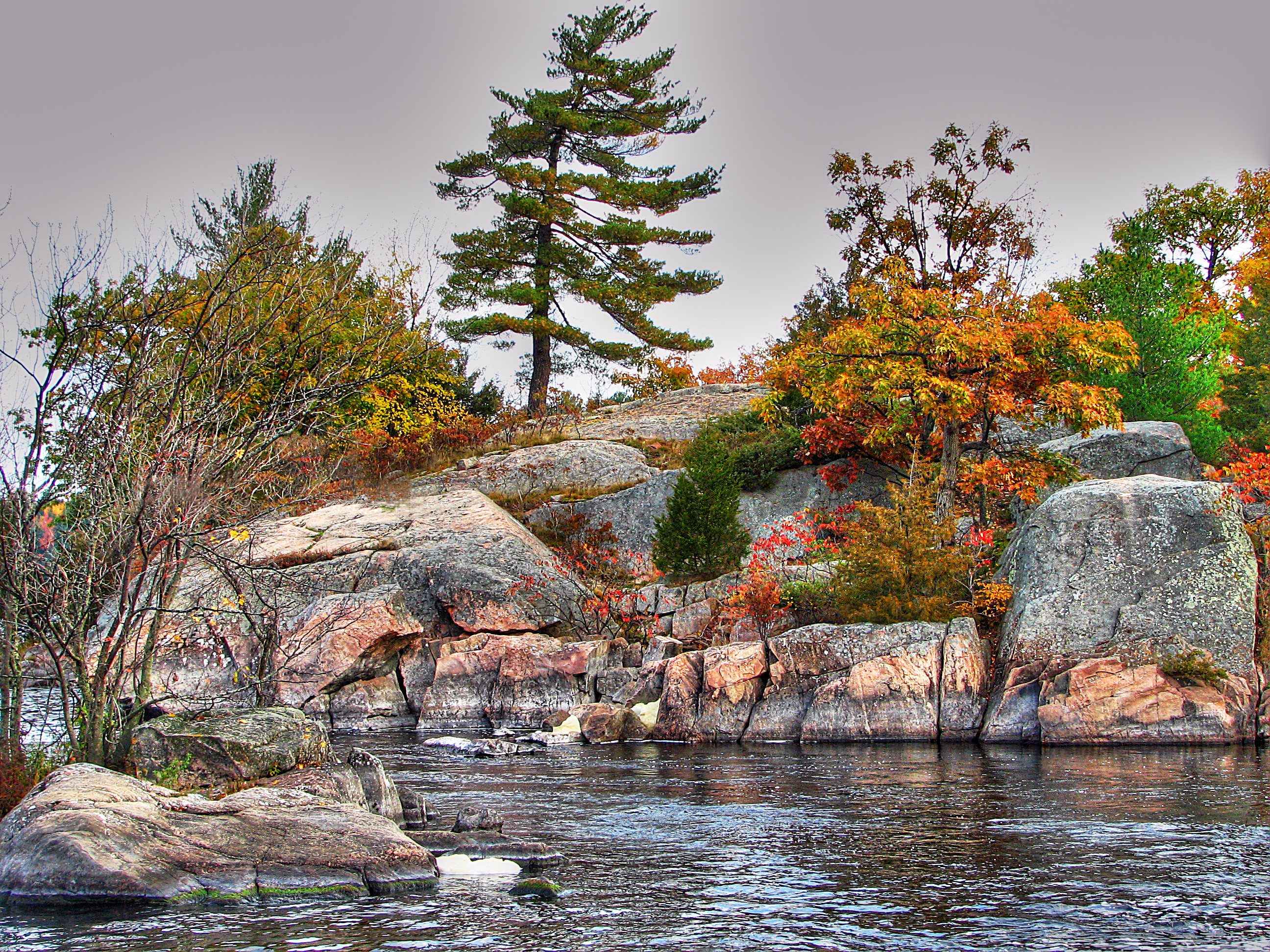 Burleigh Falls